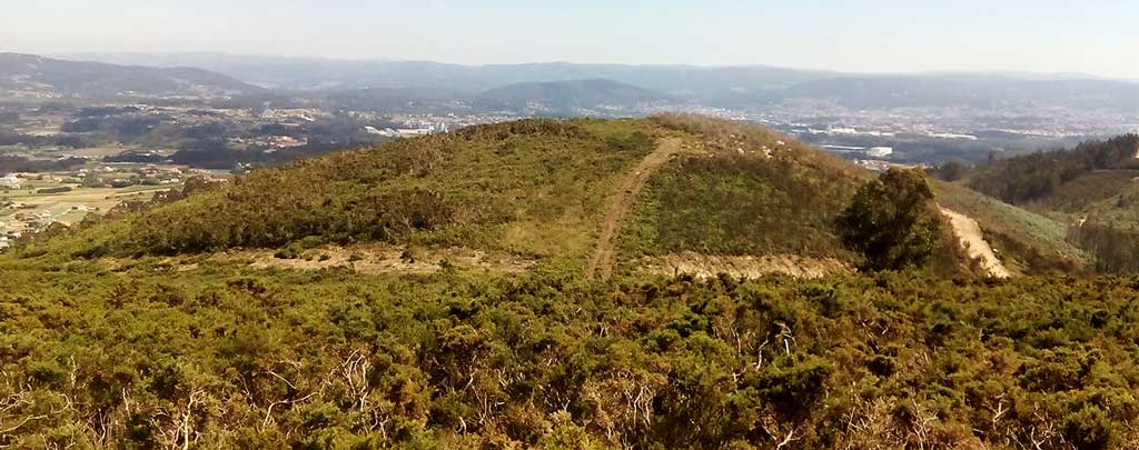 Vista de Pena Grande, O Val.